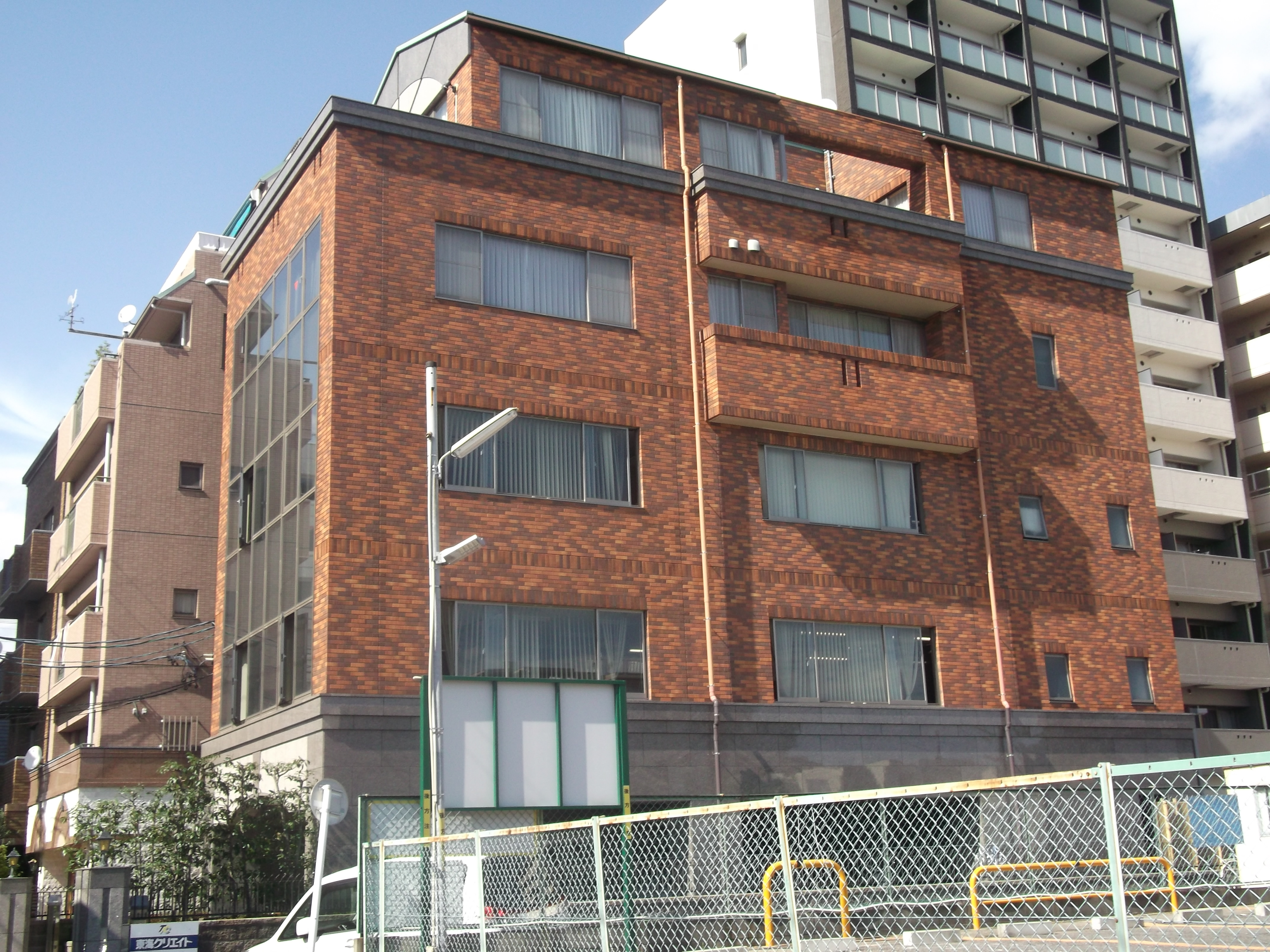 名古屋市東区の東海クリエイト本社を西側公道南側より撮影